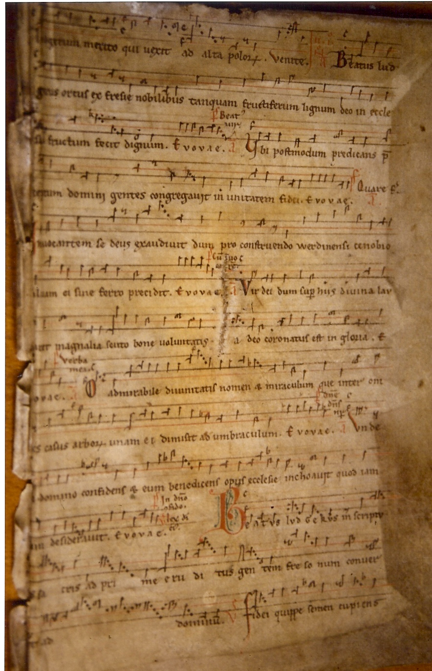 eigene Datei, Fragment aus der ehemaligen Benediktinerabtei Essen Werden (12. Jahrhundert)